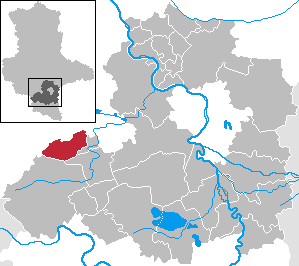 Farnstädt in Saxony-Anhalt - Saalekreis